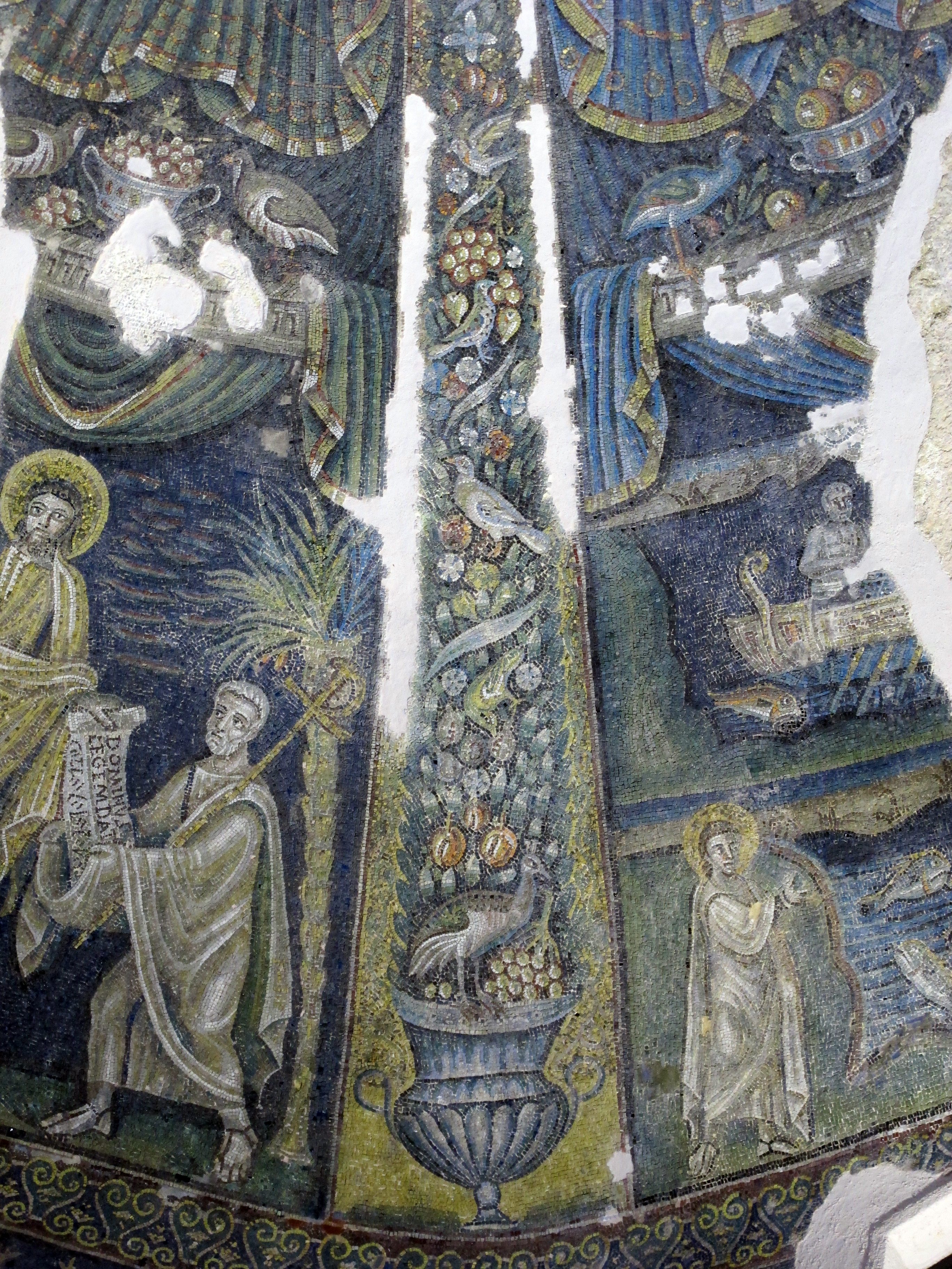 Battistero di San Giovanni in Fonte (Napoli)